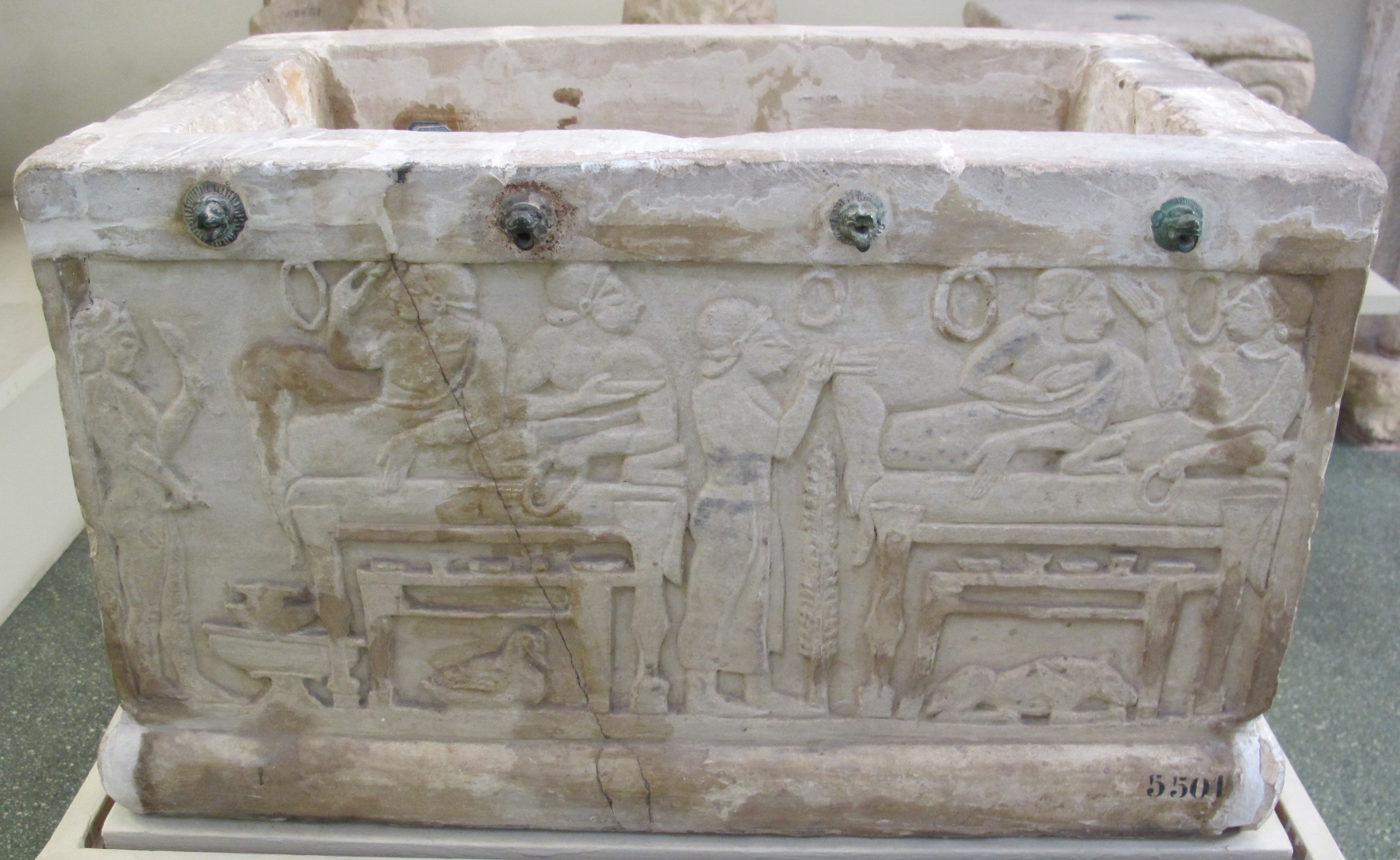 Urnetta cineraria da chiusi con scene di banchetto, 520 ac. circa